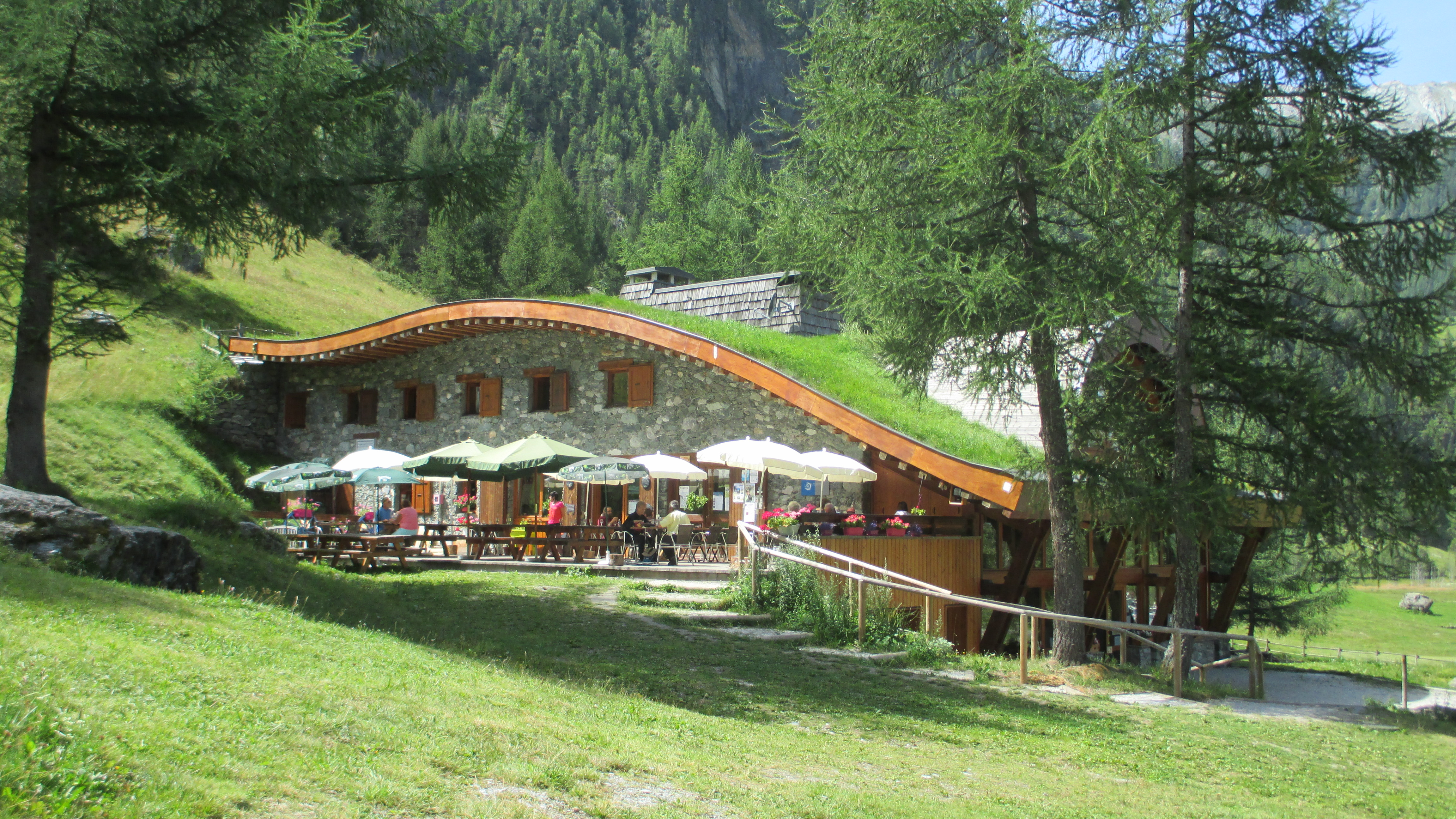 Refuge de Rosuel dans le Parc national de la Vanoise, plus précisément sur le territoire de la commune de Pensey-Nancroix (Savoie, France).